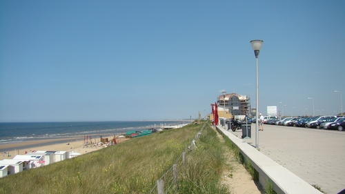 Nedersaksies: Zandvoort_straand.jpg